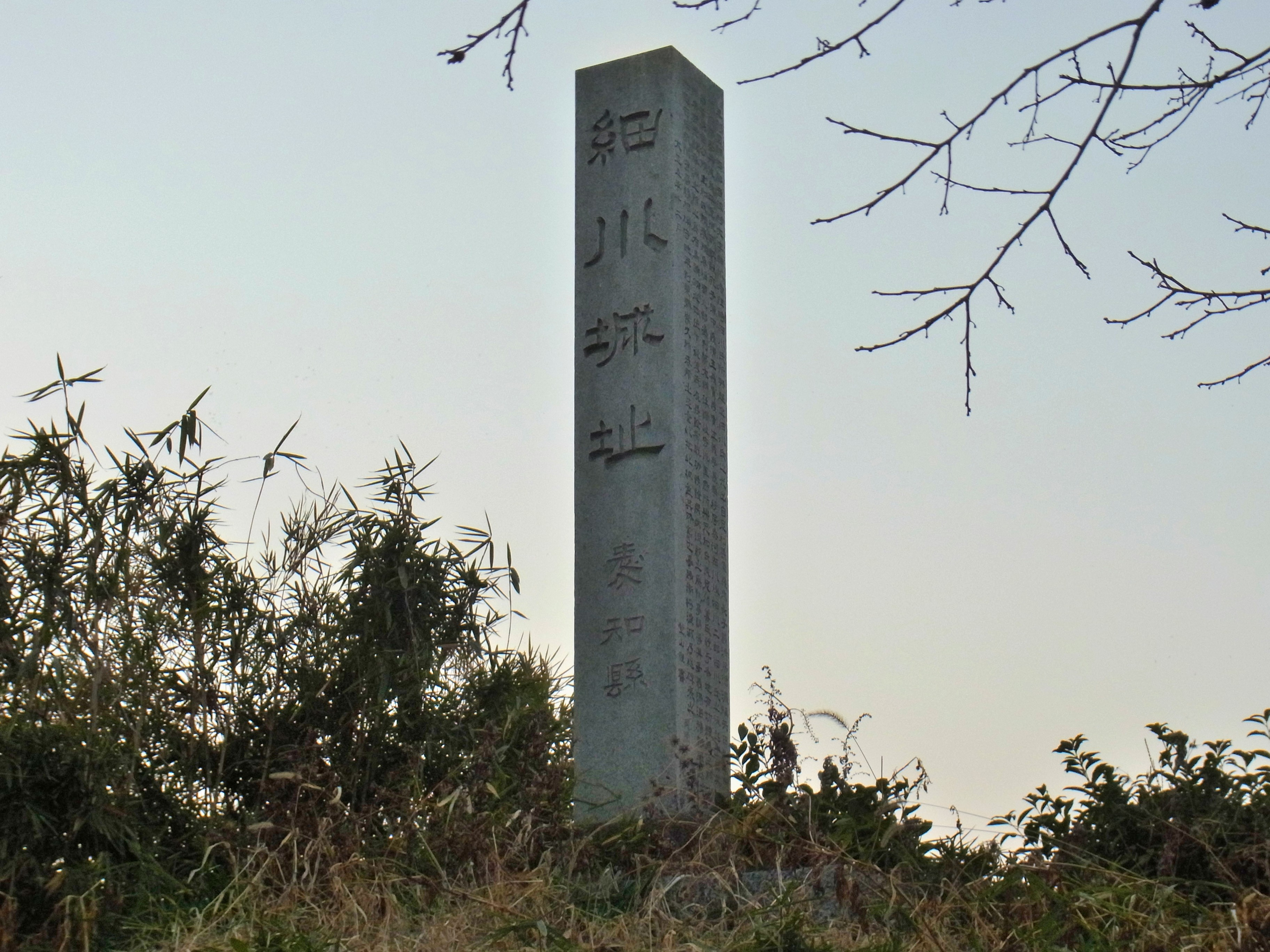 細川氏発祥地にある細川城址（愛知県岡崎市細川町）